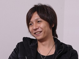 shinno